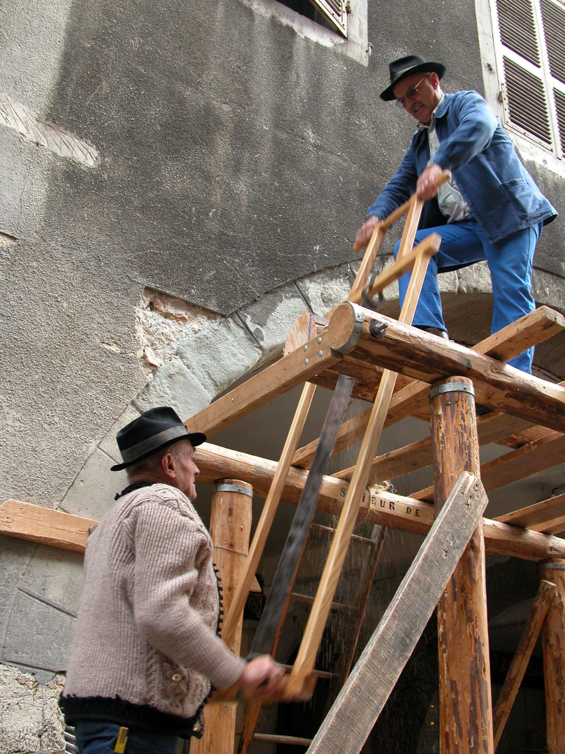 Scieurs de long.